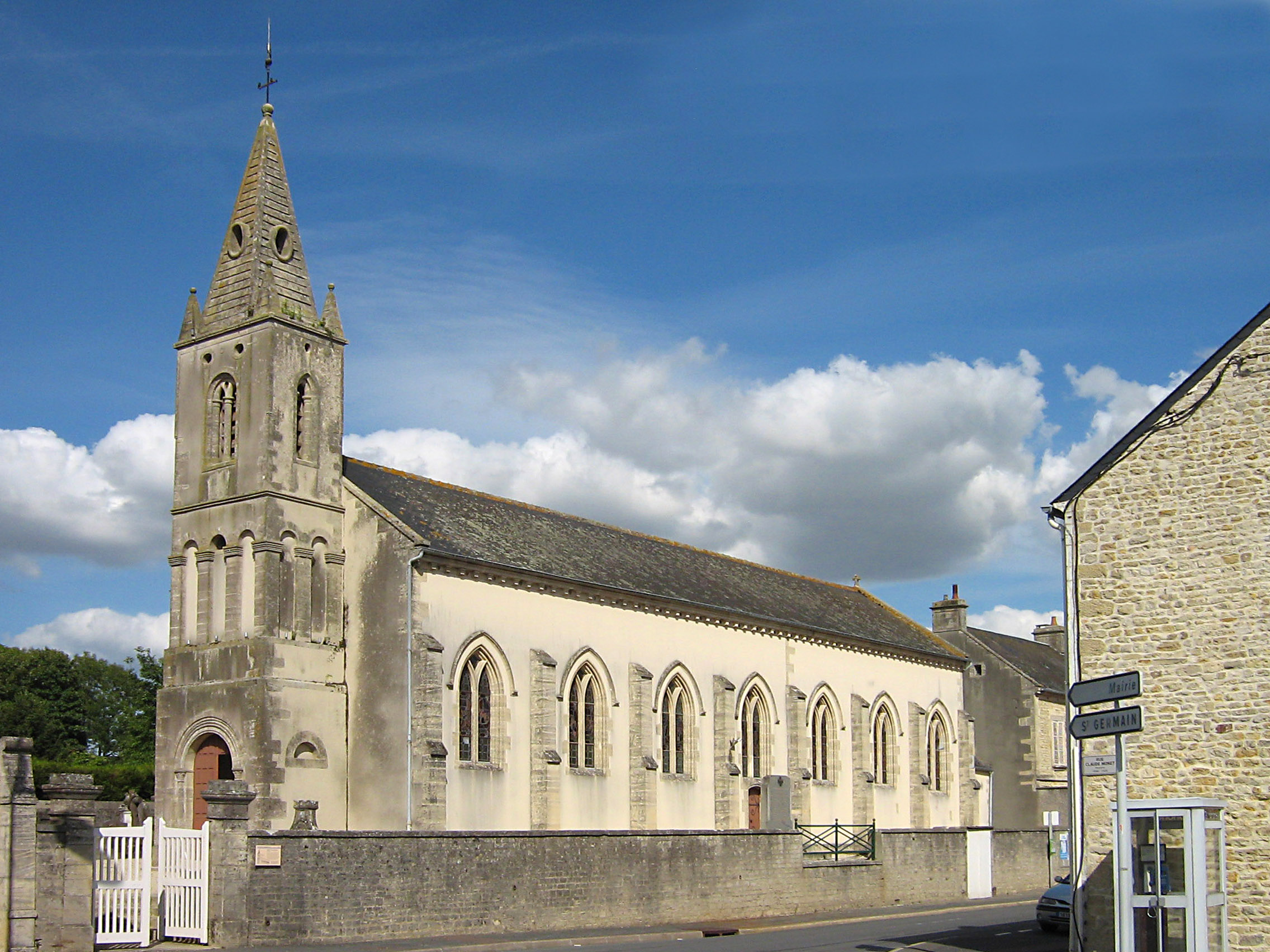 Saint-Martin-des-Entrées (Calvados)